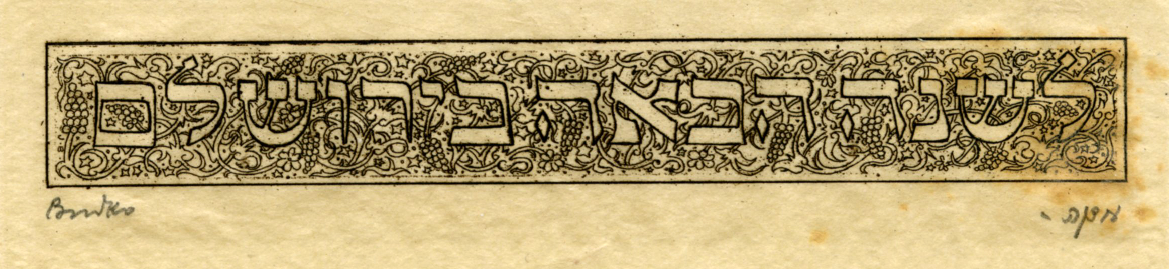 Print